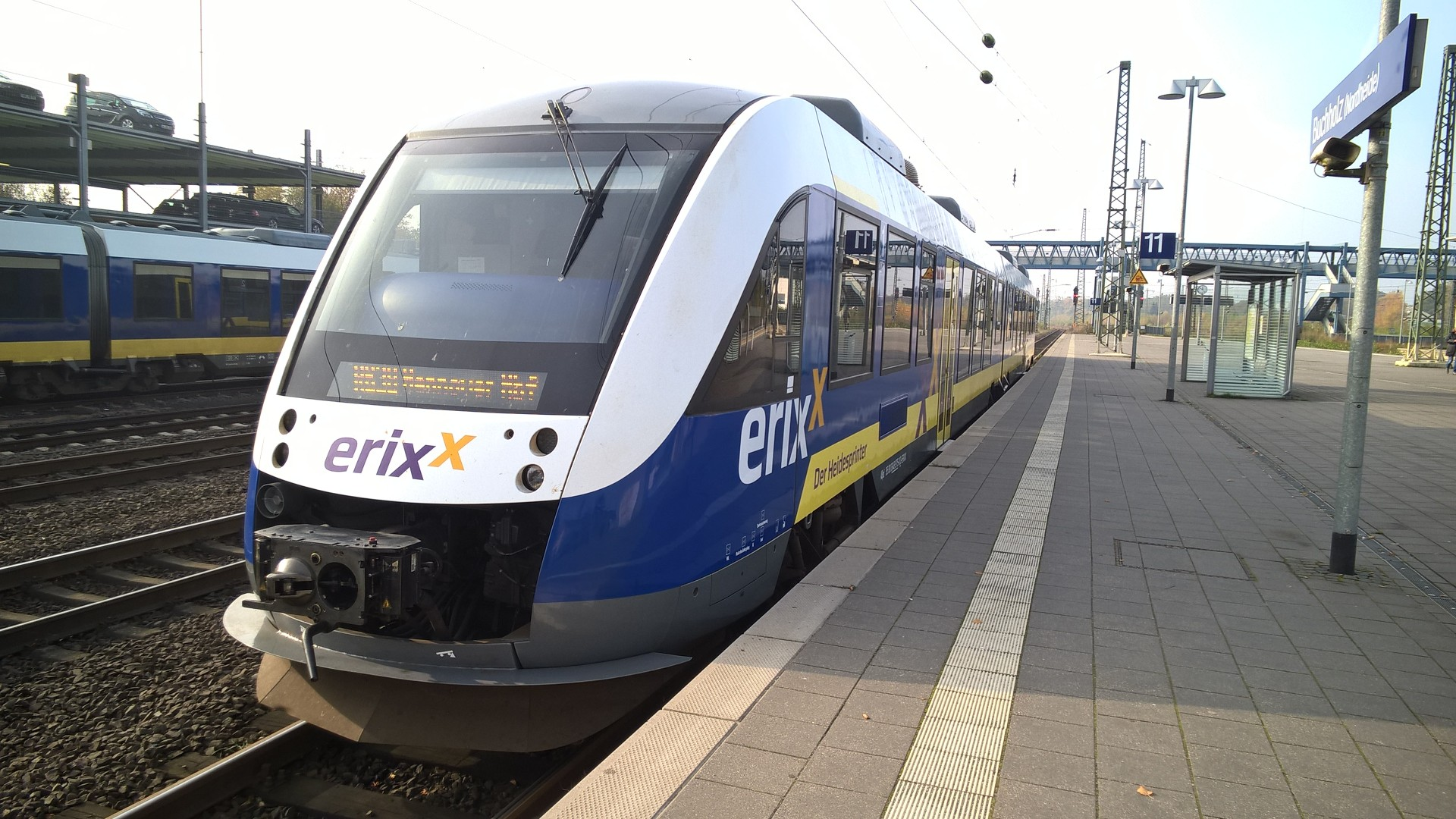 LINT 41 der erixx GmbH in Buchholz (Nordheide).